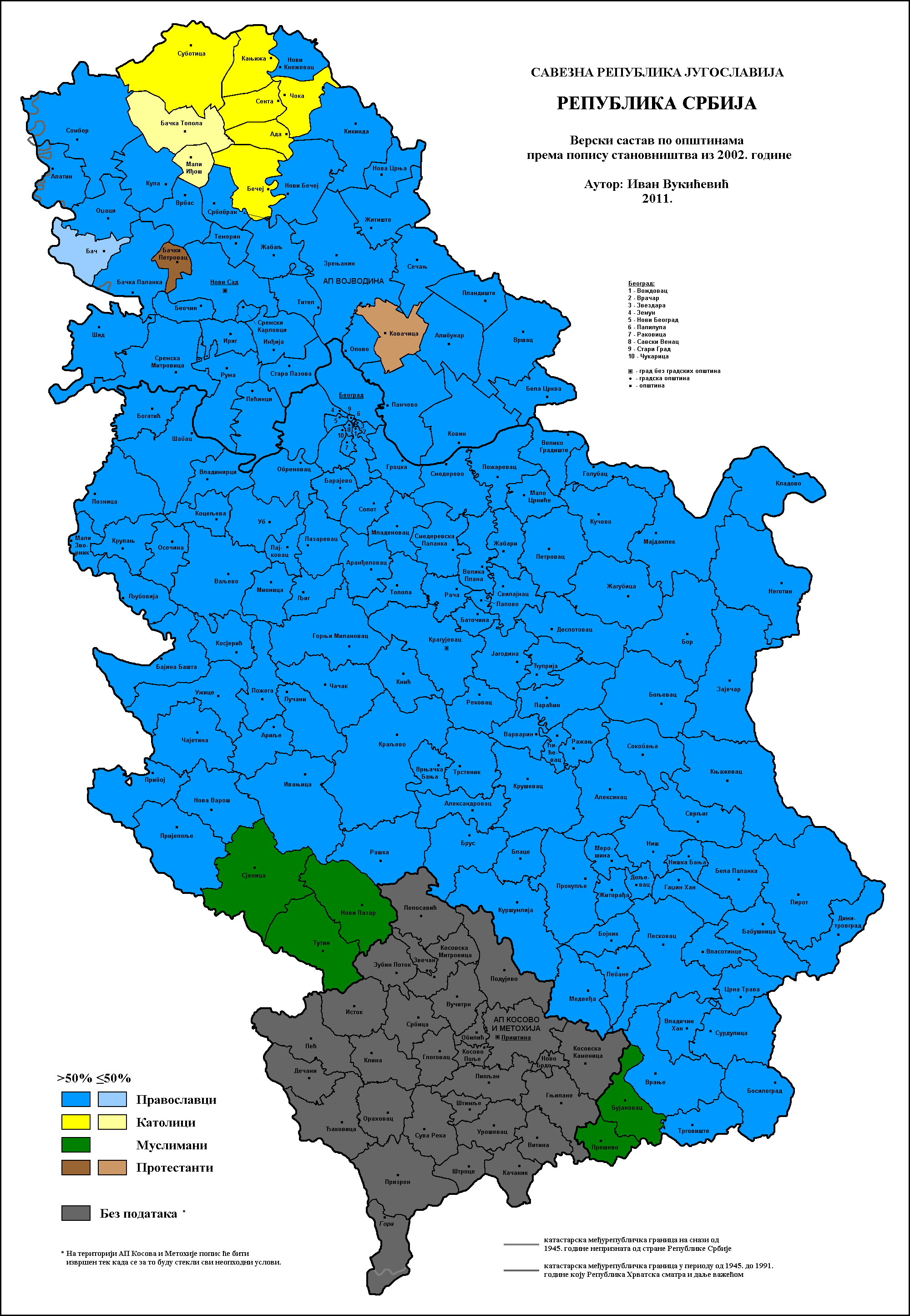 Верски састав Србије по општинама 2002. године. Аутор: Иван Вукићевић